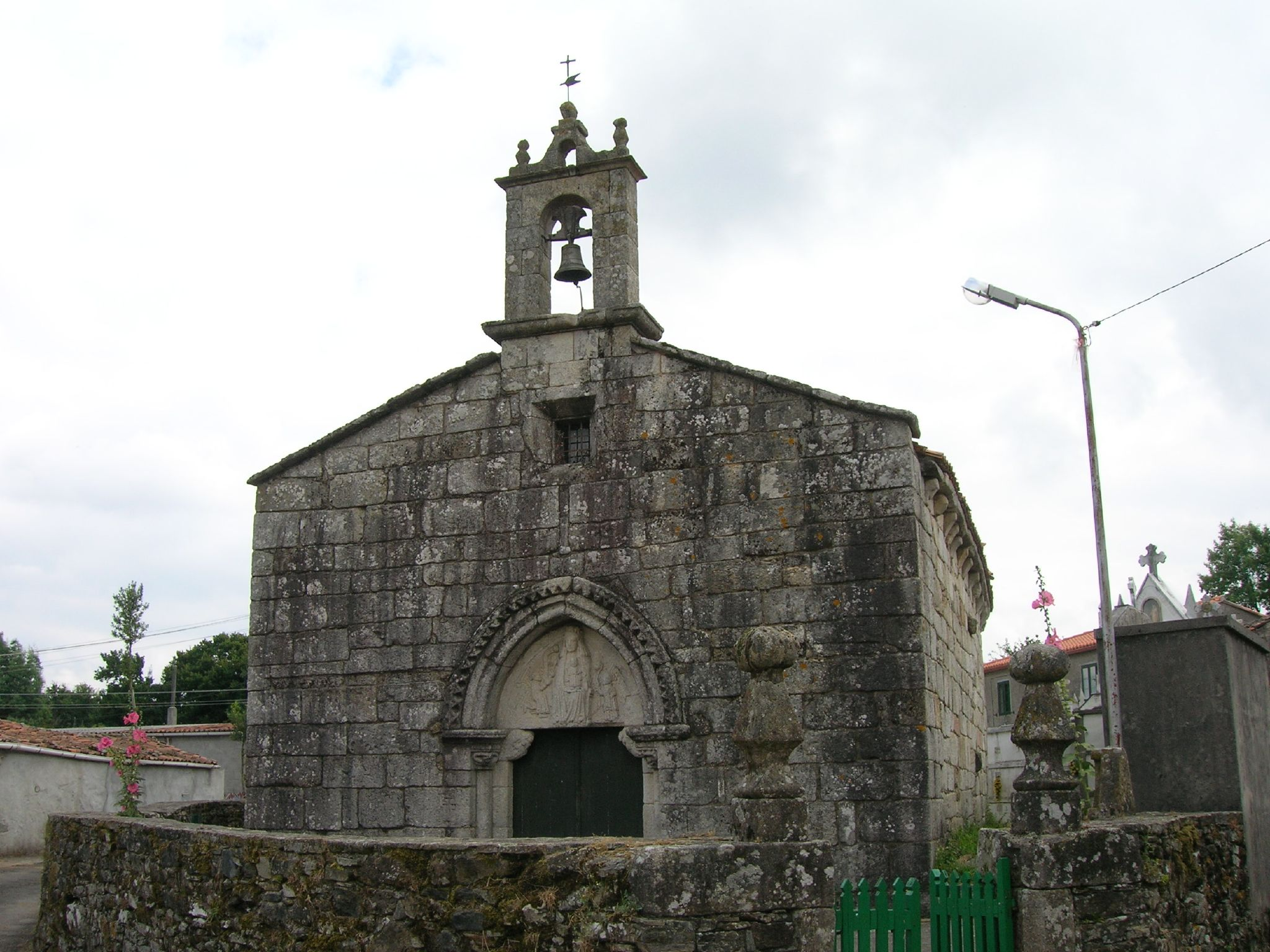 Igrexa de Santa María do Leboreiro, no concello de Melide